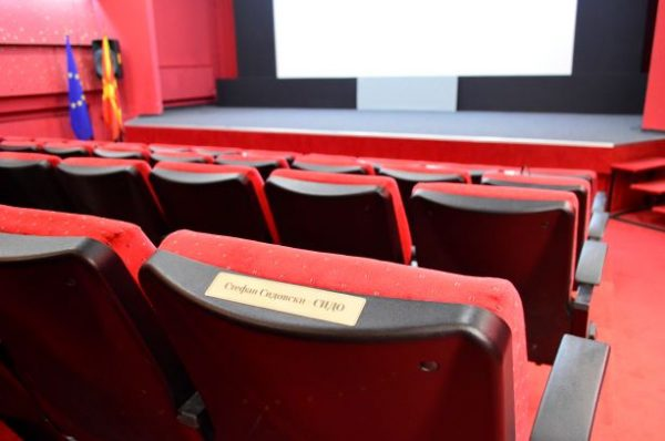 Плочка во чест на Стефан Сидовски 25 Септември 2019 год. Скопје - Кинотека на Македонија